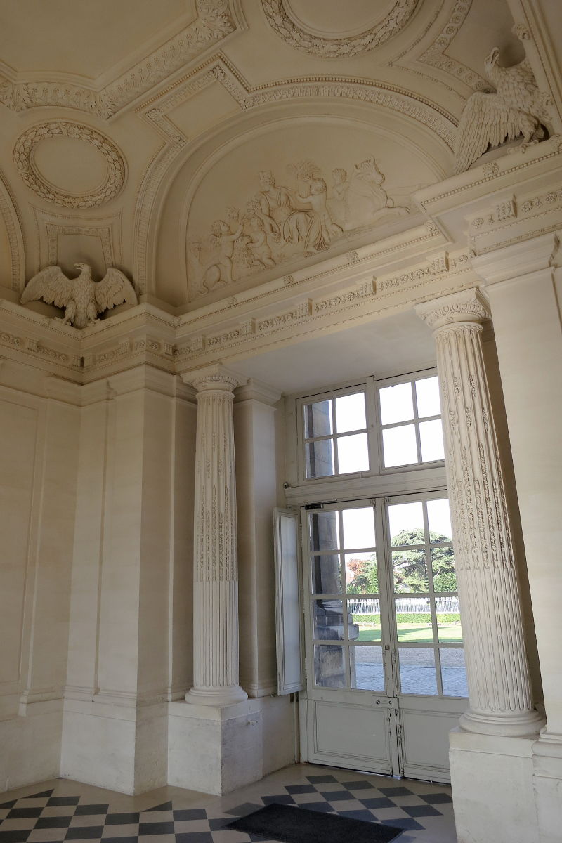 Château de Maisons-Laffitte, vestibule d'honneur